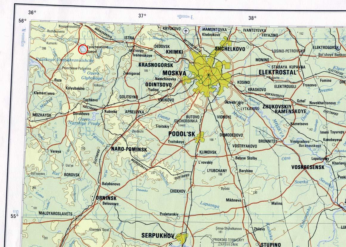 Положение Тростенского озера в Московской области